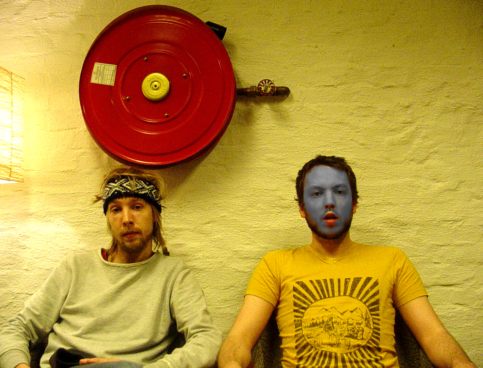 Klaus Skrudland og Knut Jonas 5000 fra Elektrofant